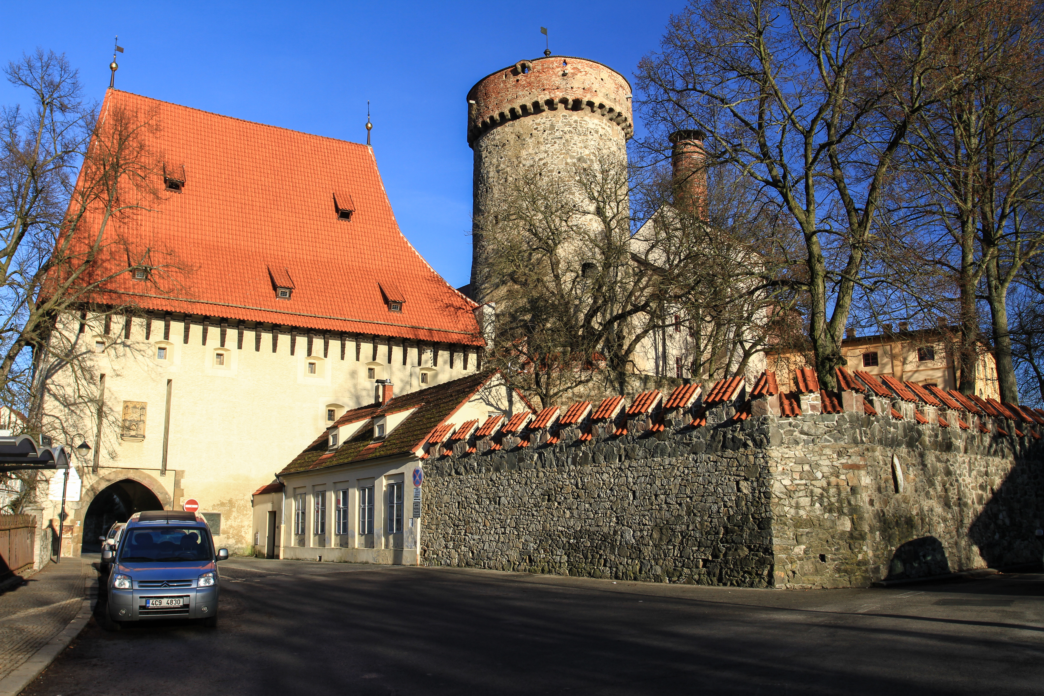 Hrad Kotnov a pivovar (Tábor), Kotnov 127, Tábor, Tábor.